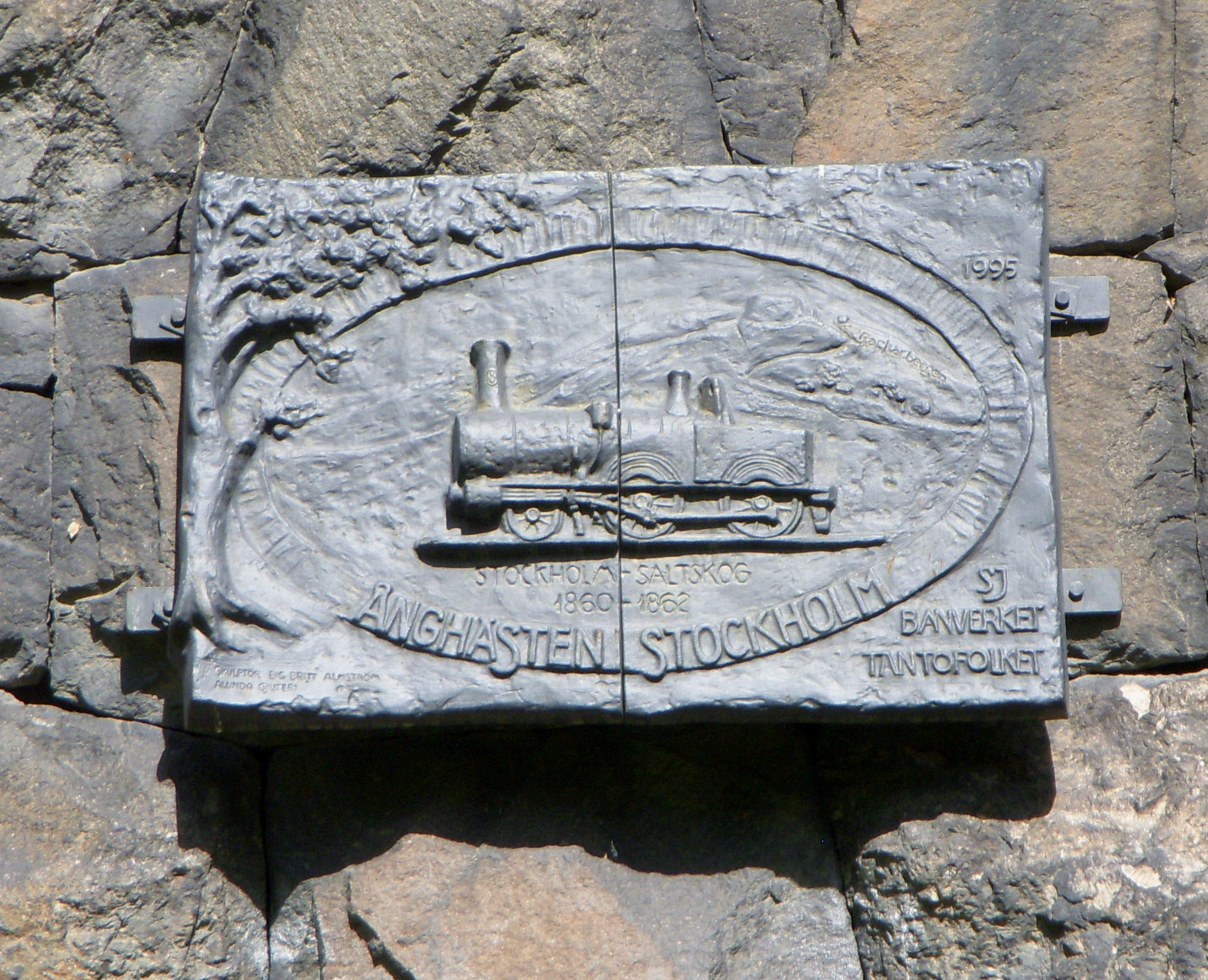 Ånghästparken, Södermalm, Stockholm, skylt